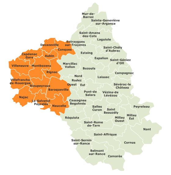 Territoire couvert par la deuxième circonscription de l'Aveyron, Midi-Pyrénées, France.